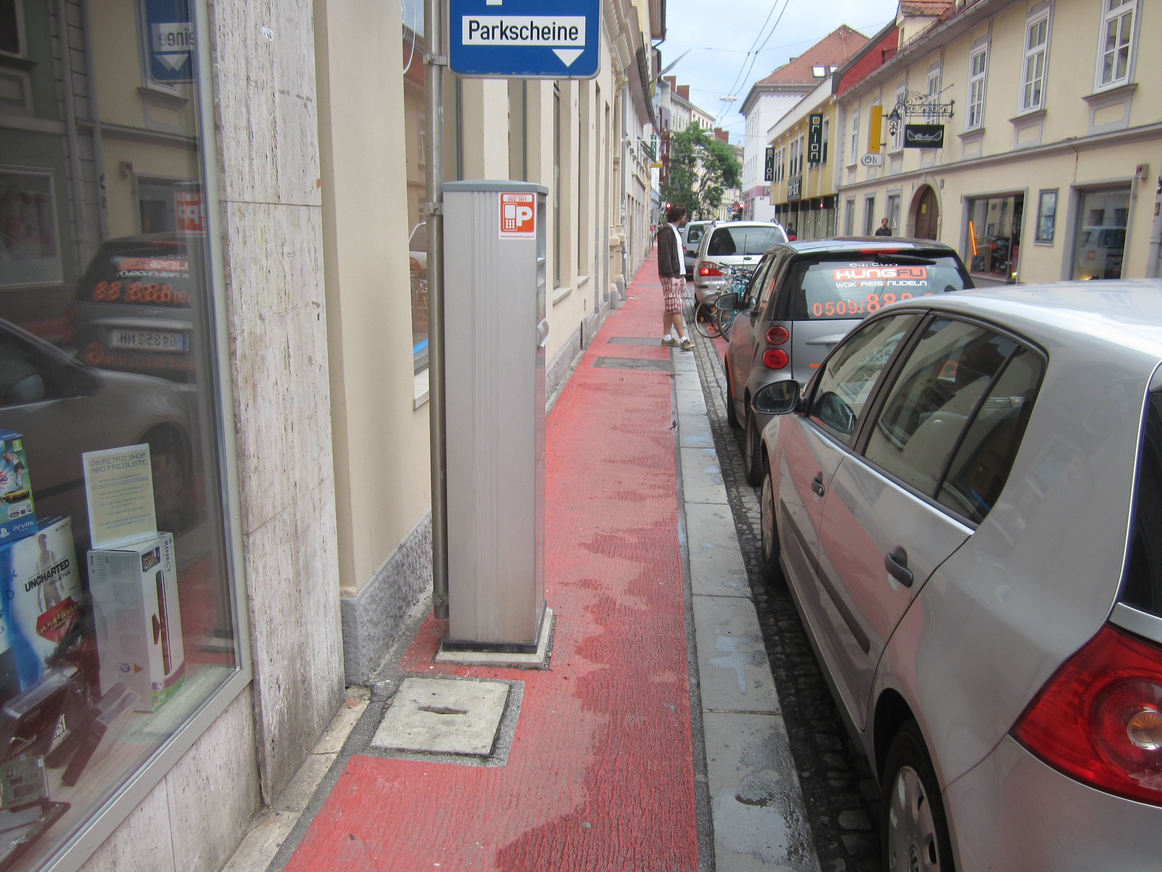 Rollstuhltauglichkeit: Parkscheinautomat versperrt Gehsteig